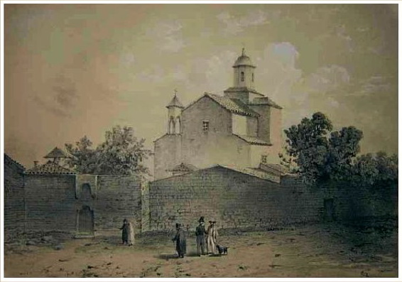 Армянская церковь архангелов Гавриила и Михаила в Феодосии, В. О. Руссен Villeneuve E. Album historique et pittoresque de la Tauride – Vol. 1 - 25. — Paris, 1858. — 200 с.